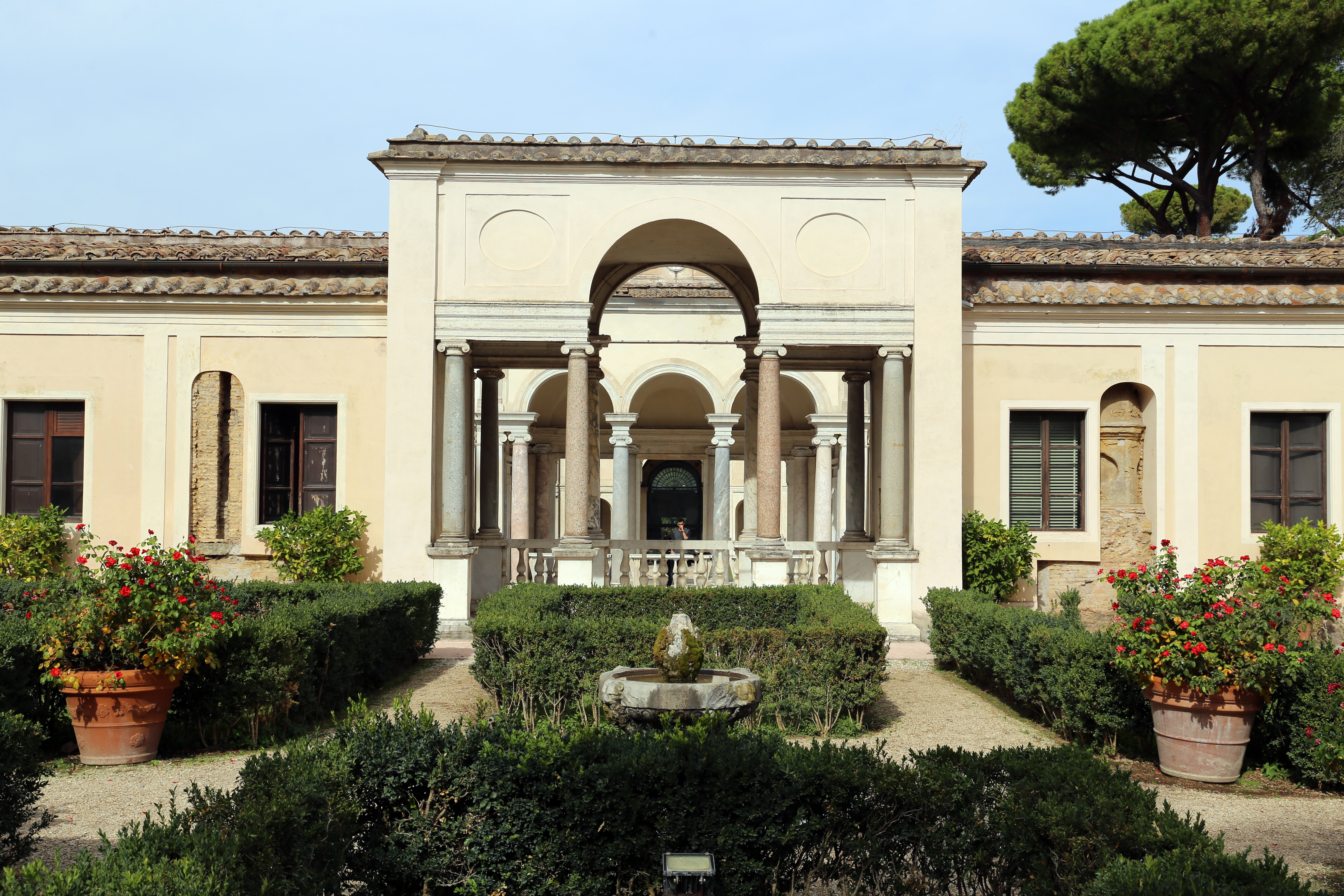 Villa Giulia (Rome) This is a photo of a monument which is part of cultural heritage of Italy.